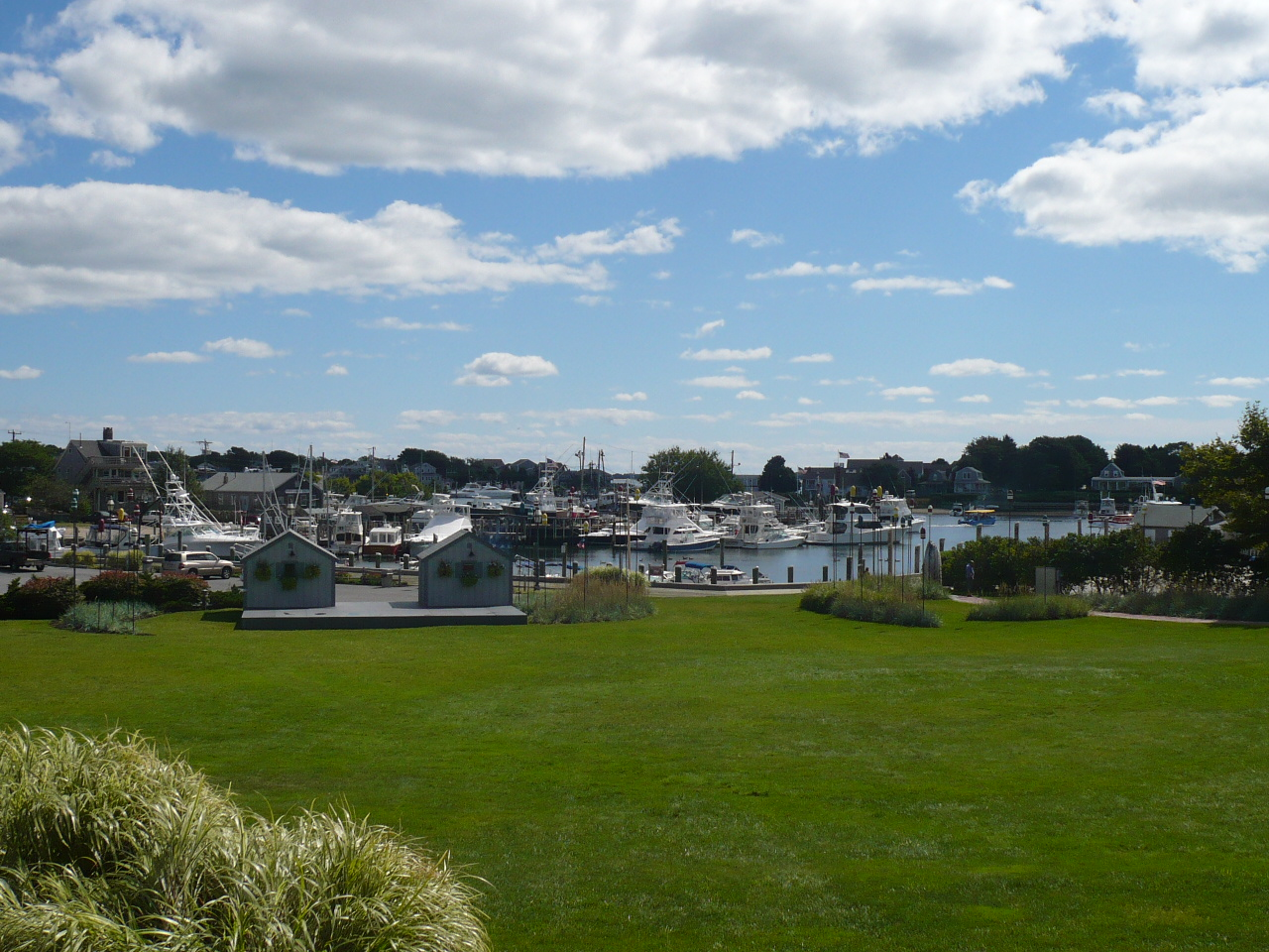 Пристанището на Хаянис и паркът преди него Licensing Препратки към файла Хаянис